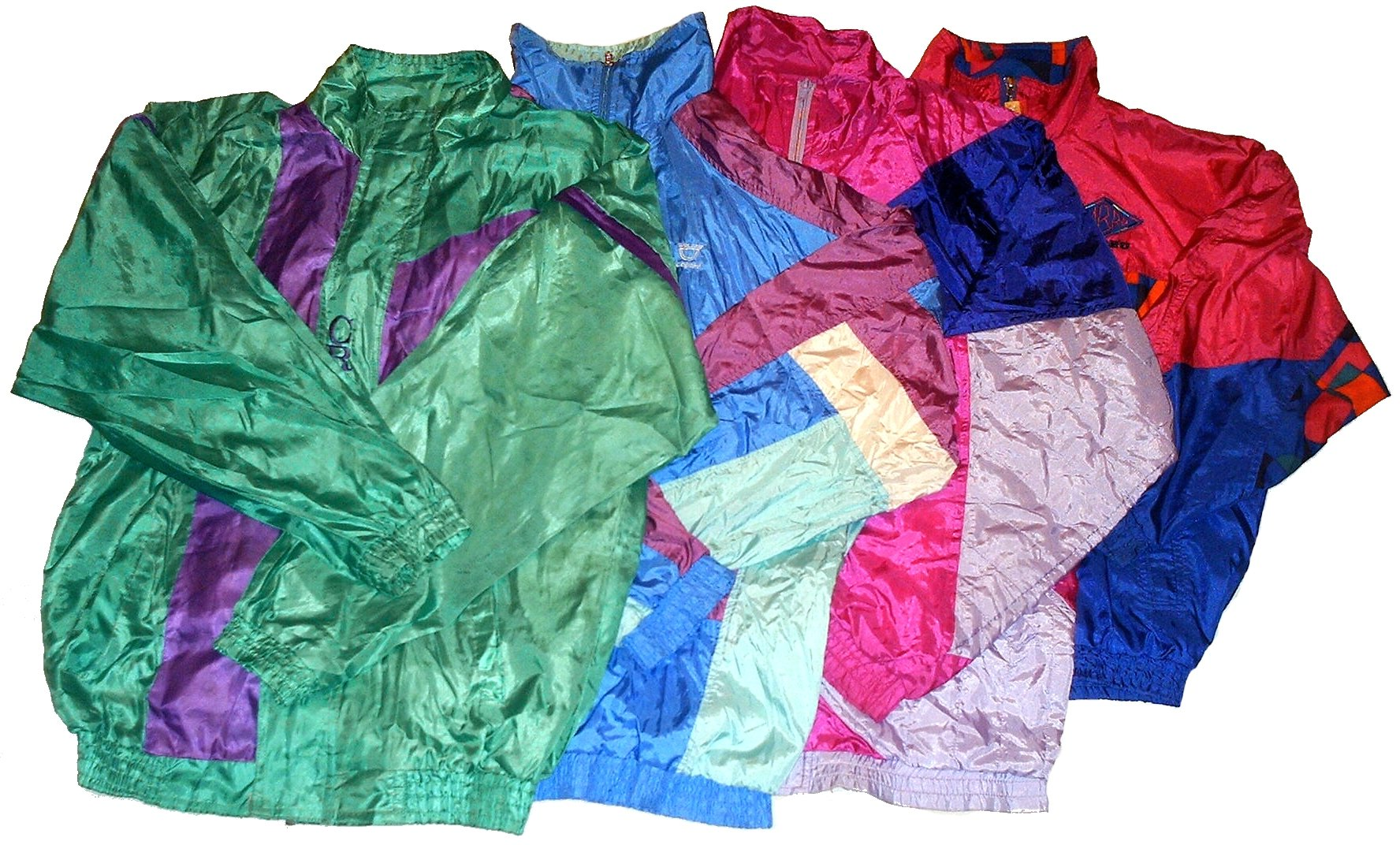 Several models of sweatsuits, made from Trilobal polyamide